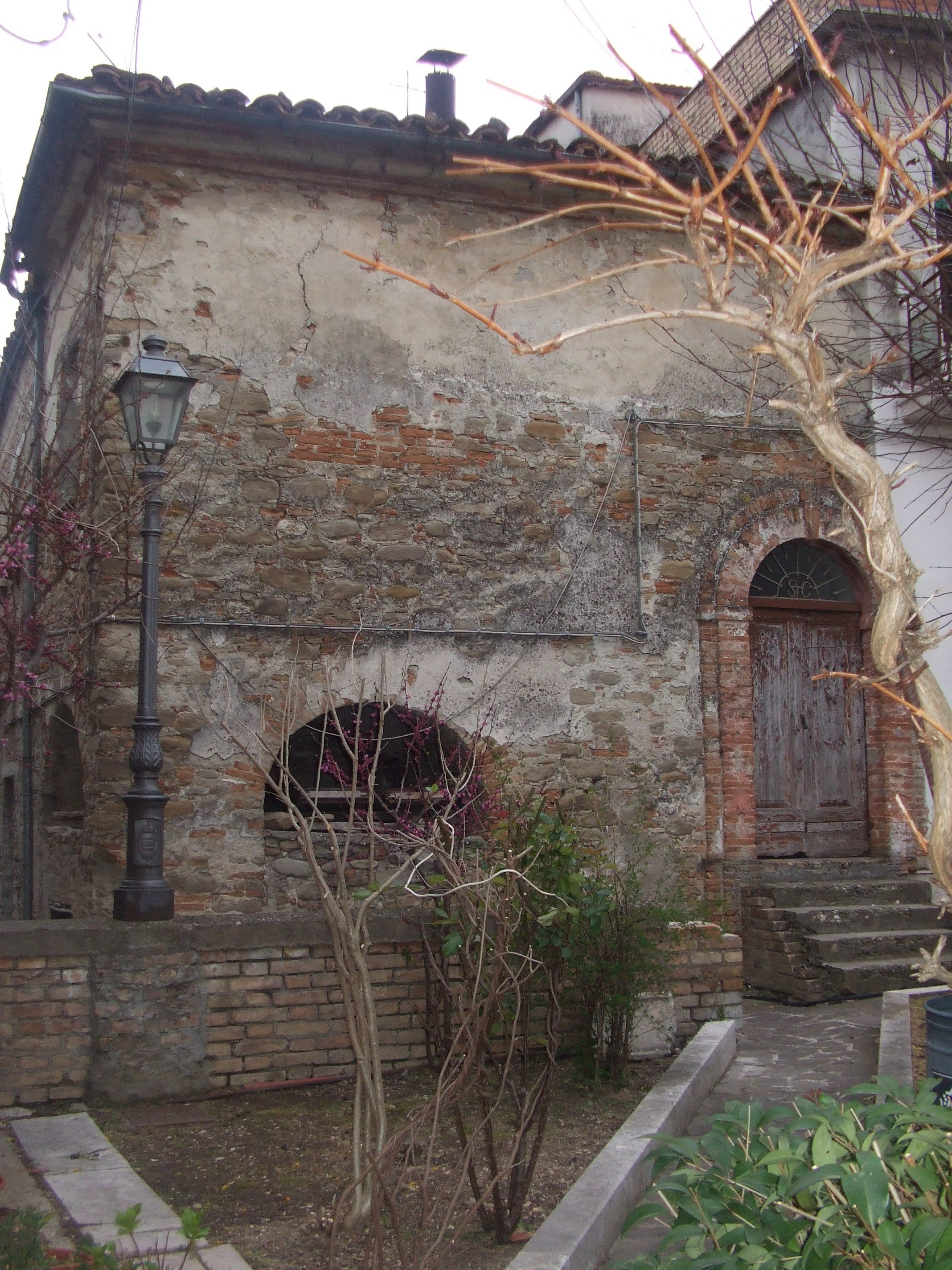 Case presso l'antica chiesa di Sant'Emidio